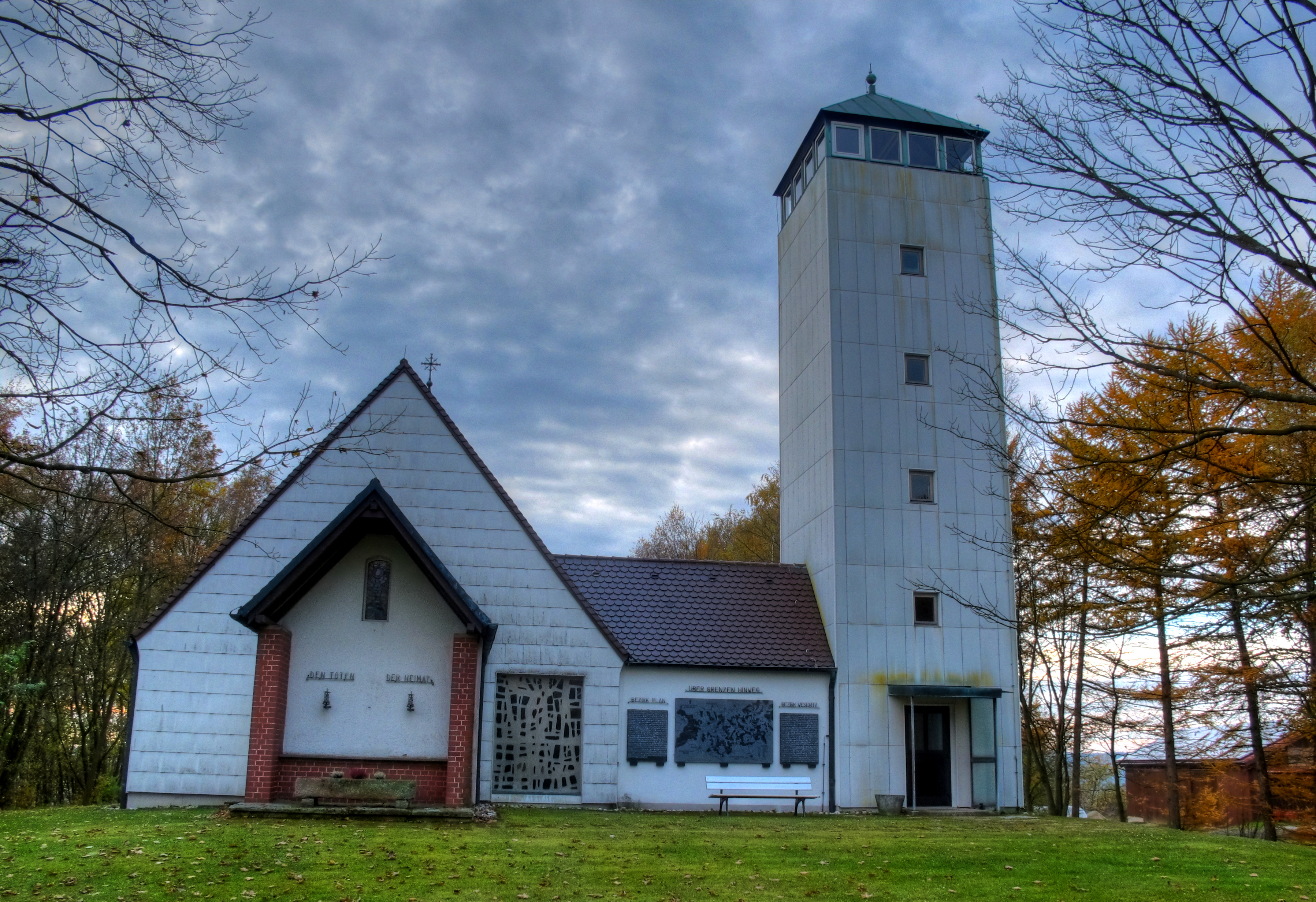 Deutschland, Bayern, Oberpfalz, Mähring, St.-Anna-Kirche mit Aussichtsturm, HDR-Aufnahme